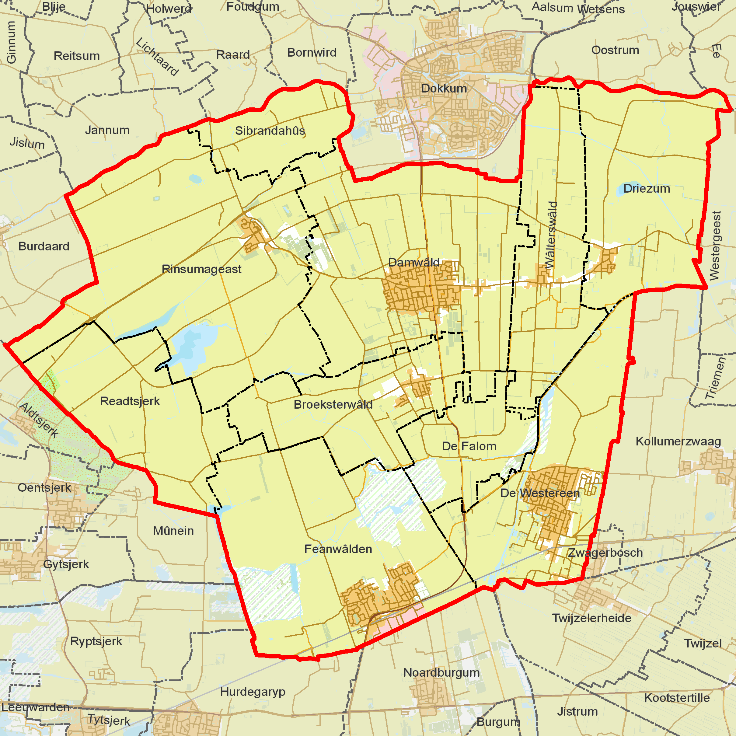 BAG woonplaatsen - Gemeente Dantumadiel.png